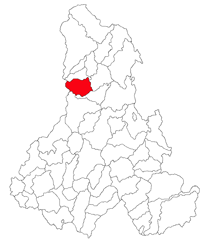 Categorie:Hărţi ale judeţului Harghita Contents 1 Licensing 2 Sursă 3 Licensing 4 Original upload log Licensing Sursă ro::Imagine:Harta_jud_Harghita.png